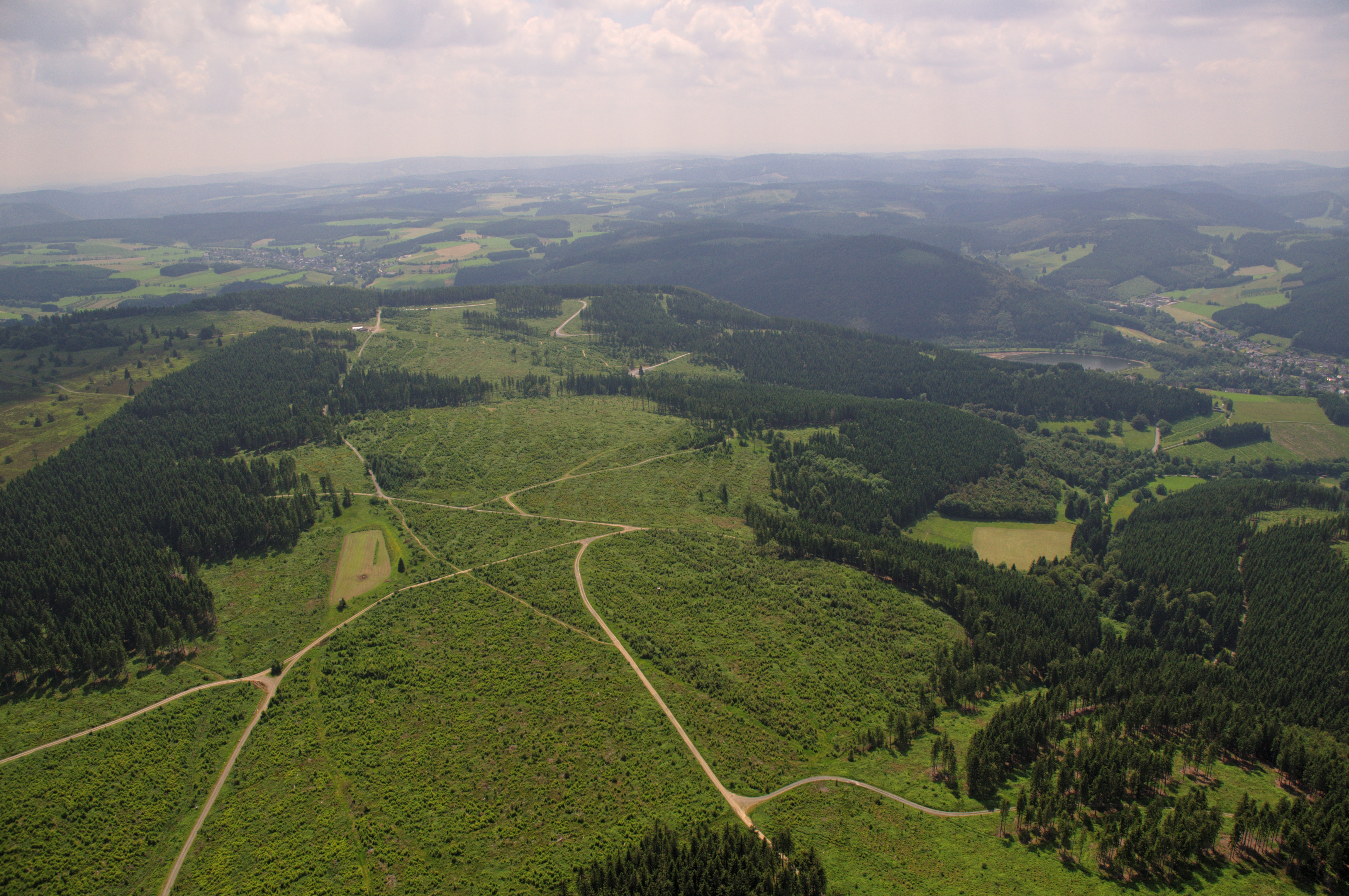 Fotoflug Sauerland-Ost: Der Rothaarsteig bei der Niedersfelder Hochheide (Naturschutzgebiet Neuer Hagen, HSK-006) am Clemensberg nordöstlich von Niedersfeld; Blickrichtung Süden The making of this document was supported by the Community-Budget of Wikimedia Germany.